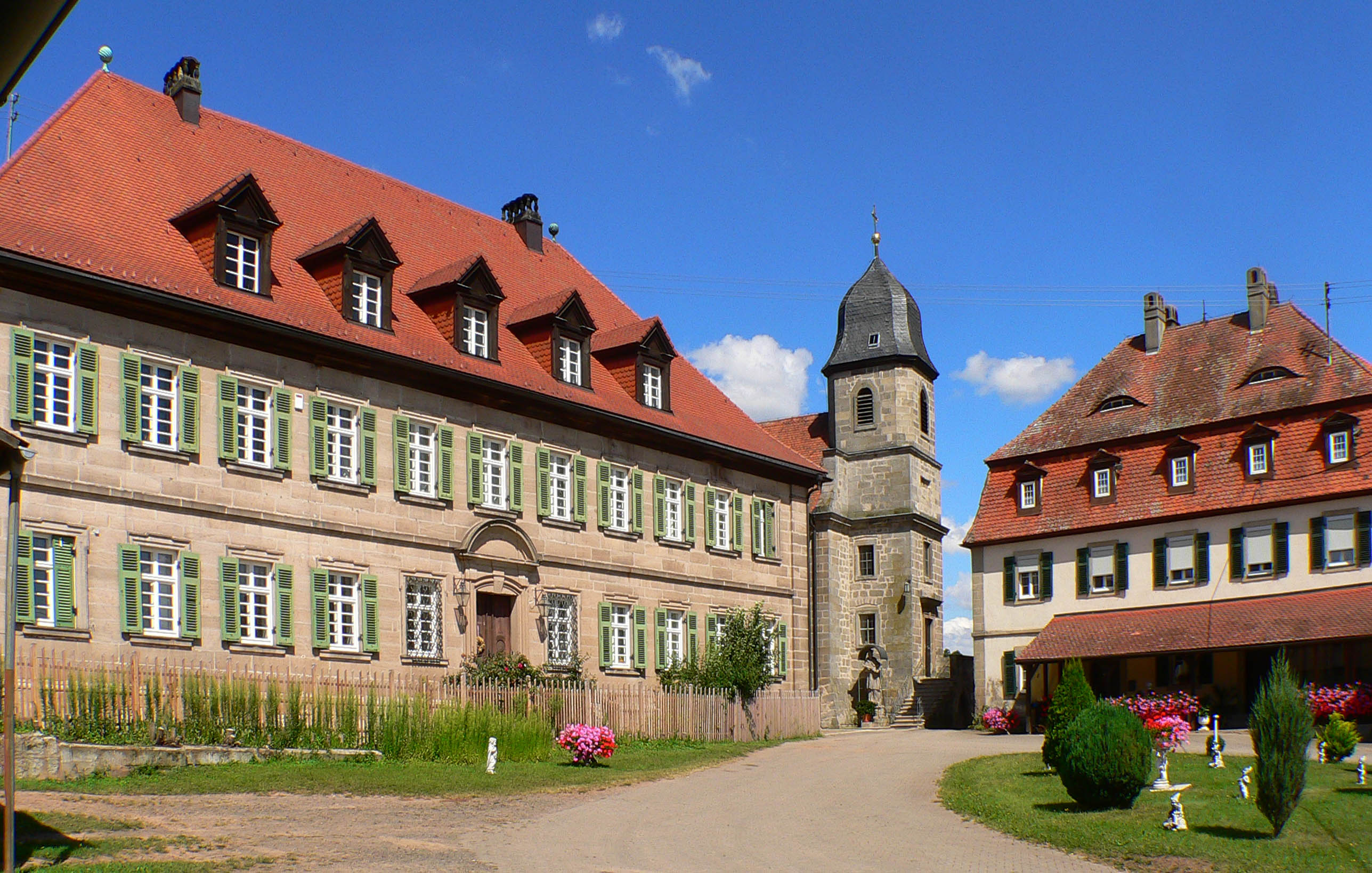 Schloss Stöckach in Bundorf-Stöckach, Landkreis Haßberge, Bayern. Die Herren von Hettersdorf ließen bis 1770 das Schloss Stöckach und die katholische Kirche erbauen. Möglicherweise zur Finanzierung verkauften sie 1770 das Dorf an die Familie von Drachsdorf, diesen folgten die Hutten zu Stolzenberg. Von 1908 - 1935 war der ehemalige bayerische Gesandte in Sankt Petersburg (von 1909-1914) Johann Georg Ernst Freiherr von Grunelius (1864-1943) Schlossbesitzer. Schloss Stöckach lag nur ca. 15 km vom väterlichen Schloss Oberlauringen, bzw. 20 km von seinem Geburtsort Gut Rothhof entfernt. Er war verheiratet mit Anna von Bernstorff (1871-1935), die hier verstarb. Nach dem Tod seiner Ehefrau verkauft er dies Schloss. Er starb am 15.12.1943 in München.